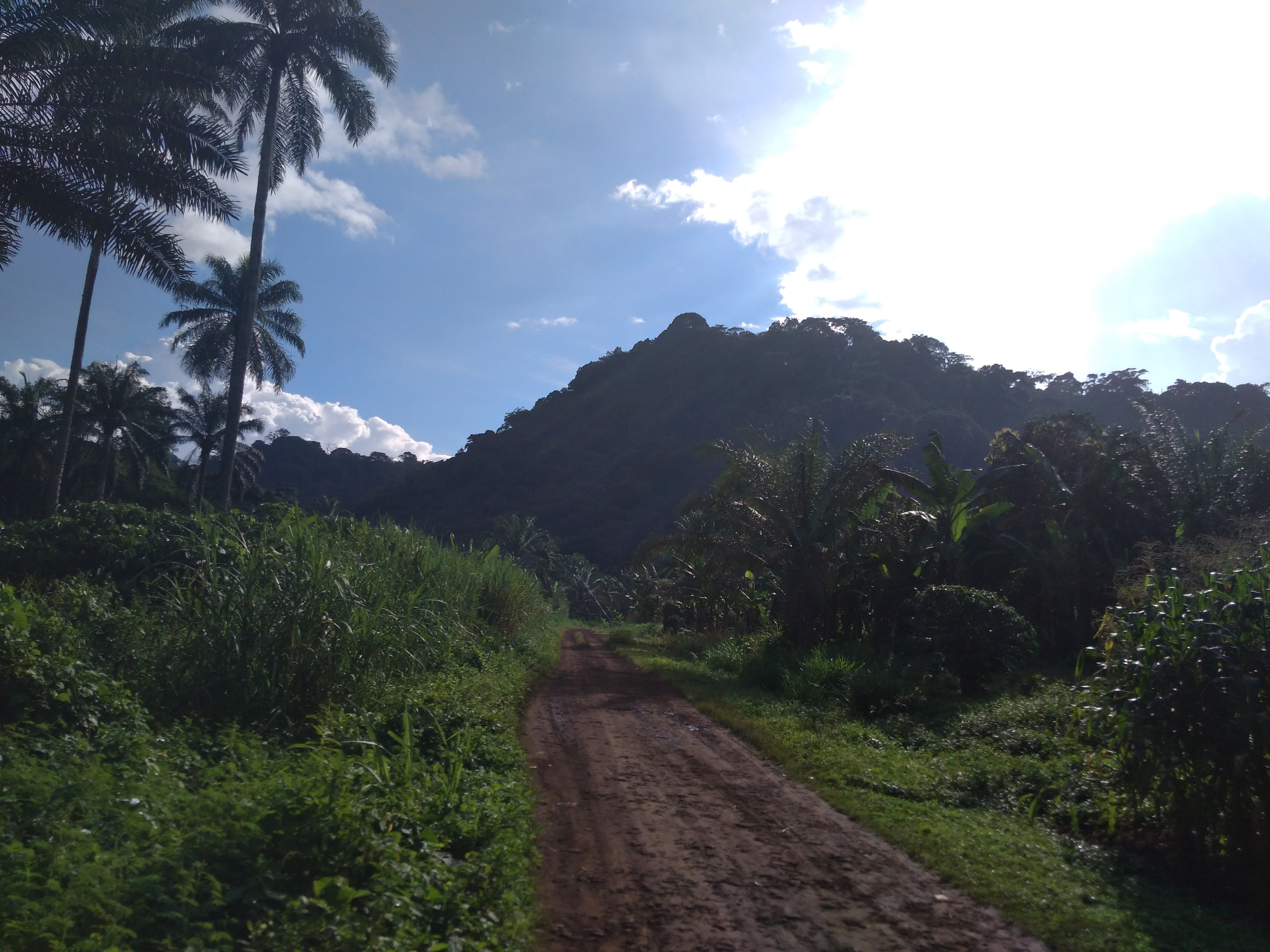 Cette image présente le Mont Manengouba , situé à Nkongsamba, dans la région du Littoral .